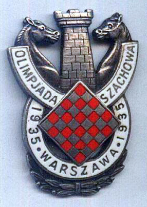 Odznaka Olimpiady Szachowej w Warszawie 1935 r. projekt Jerzy Steifer